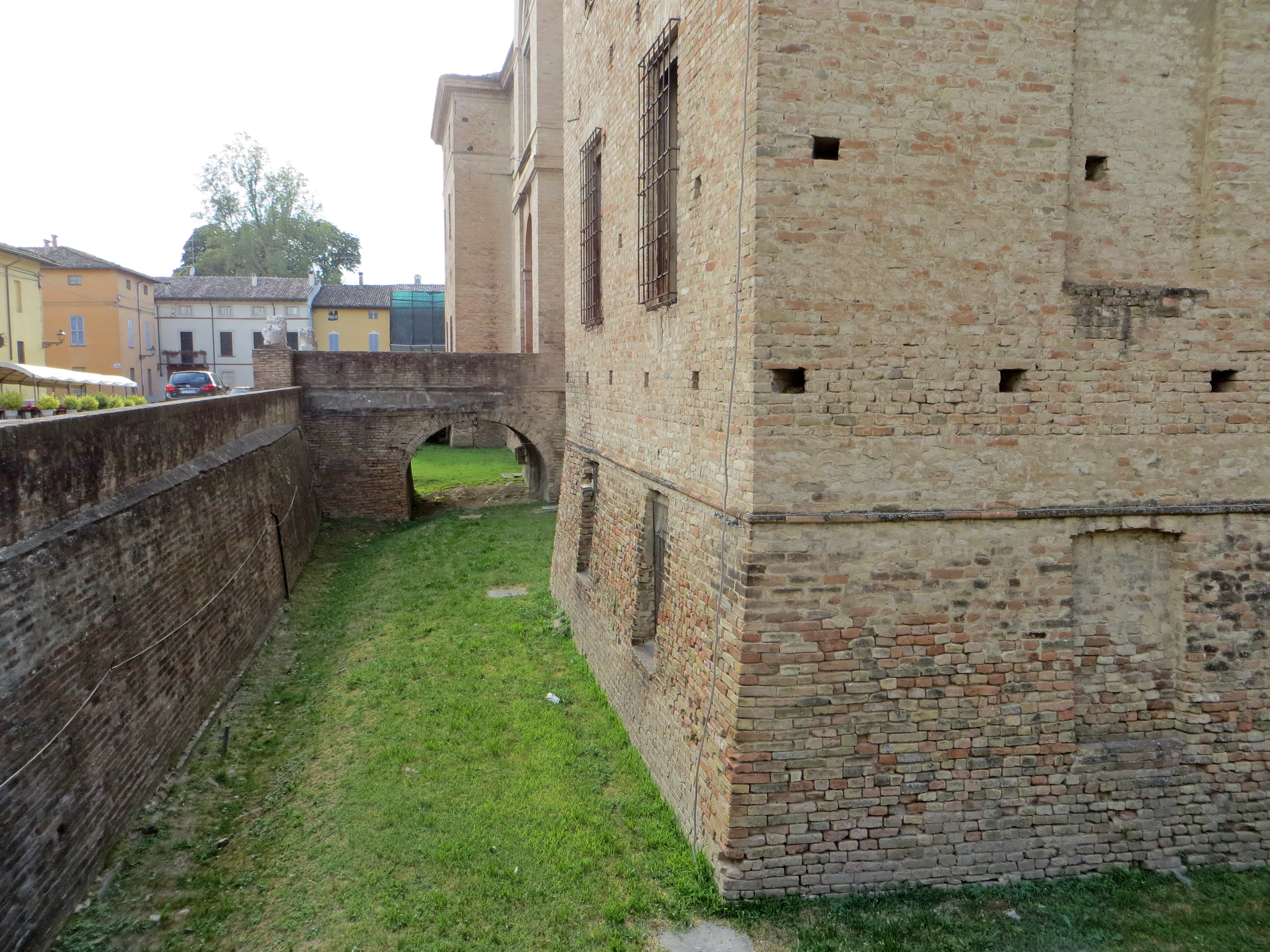 Rocca Meli Lupi (Soragna) - fossato e ponticello d'ingresso